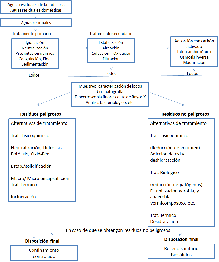 Esquema de tratamiento de lodos derivados de tratamiento de aguas servidas domiciliares e industriales